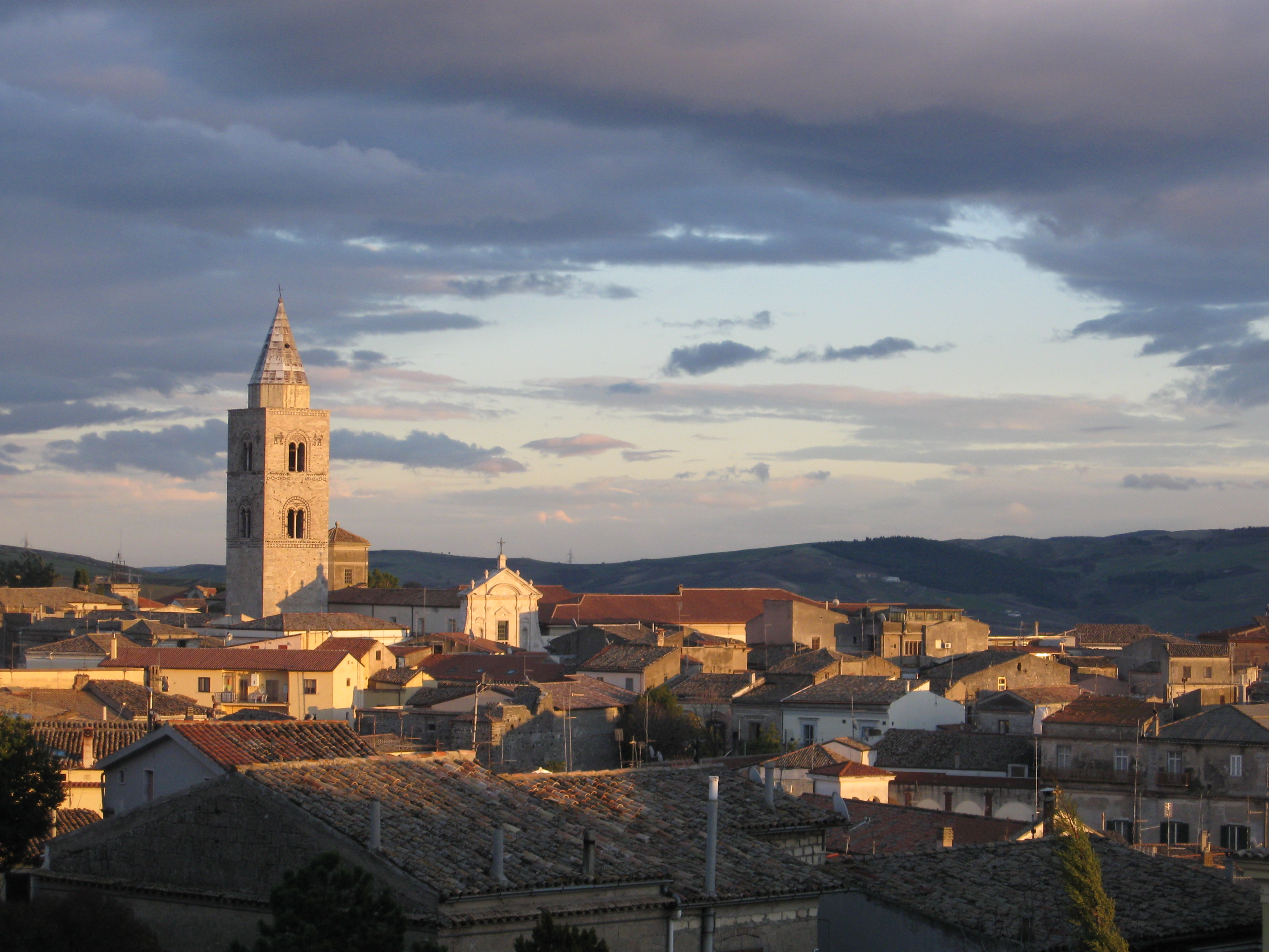 Panorama di Melfi, Basilicata